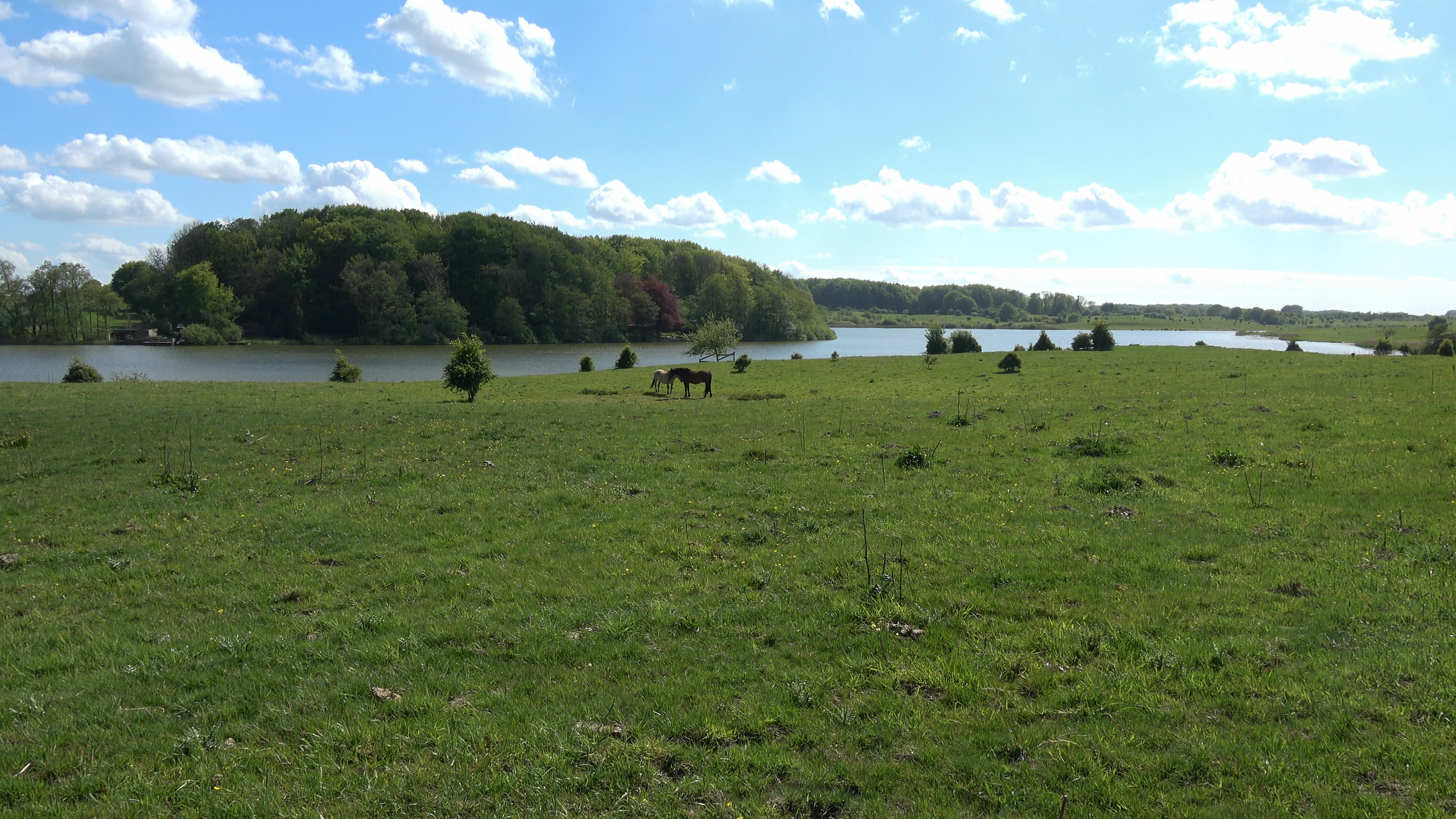 Der Winderatter See ist Teil des FFH-Gebietes Treene, Winderatter See bis Friedrichstadt